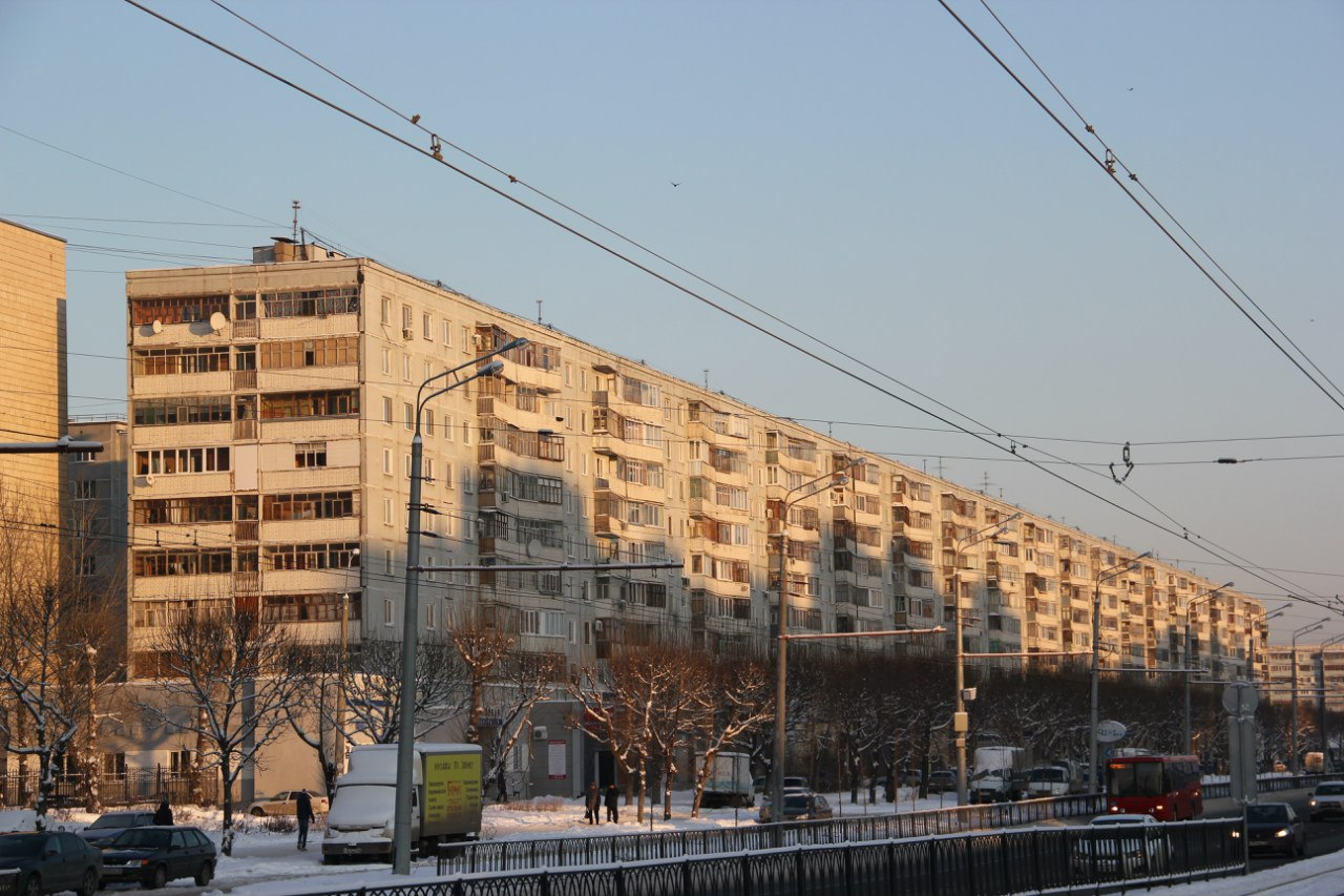 длинный панельный дом 121-й серии